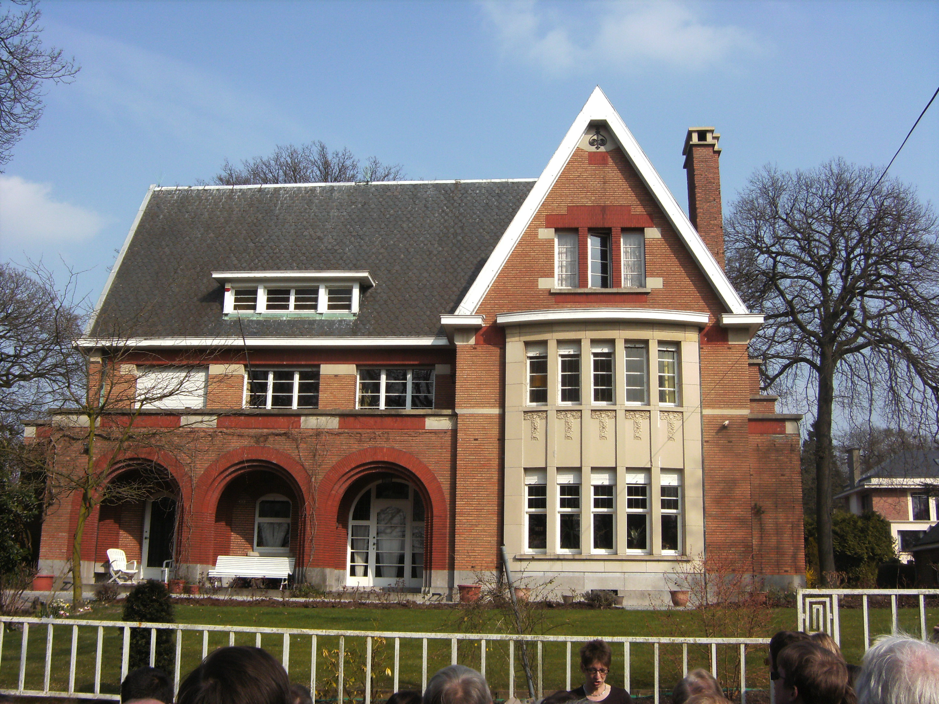 Loverval (Gerpinnes-Belgique) - rue du Grand Chénia, n° 13 - Habitation familiale - architecte : Joseph André - 1932